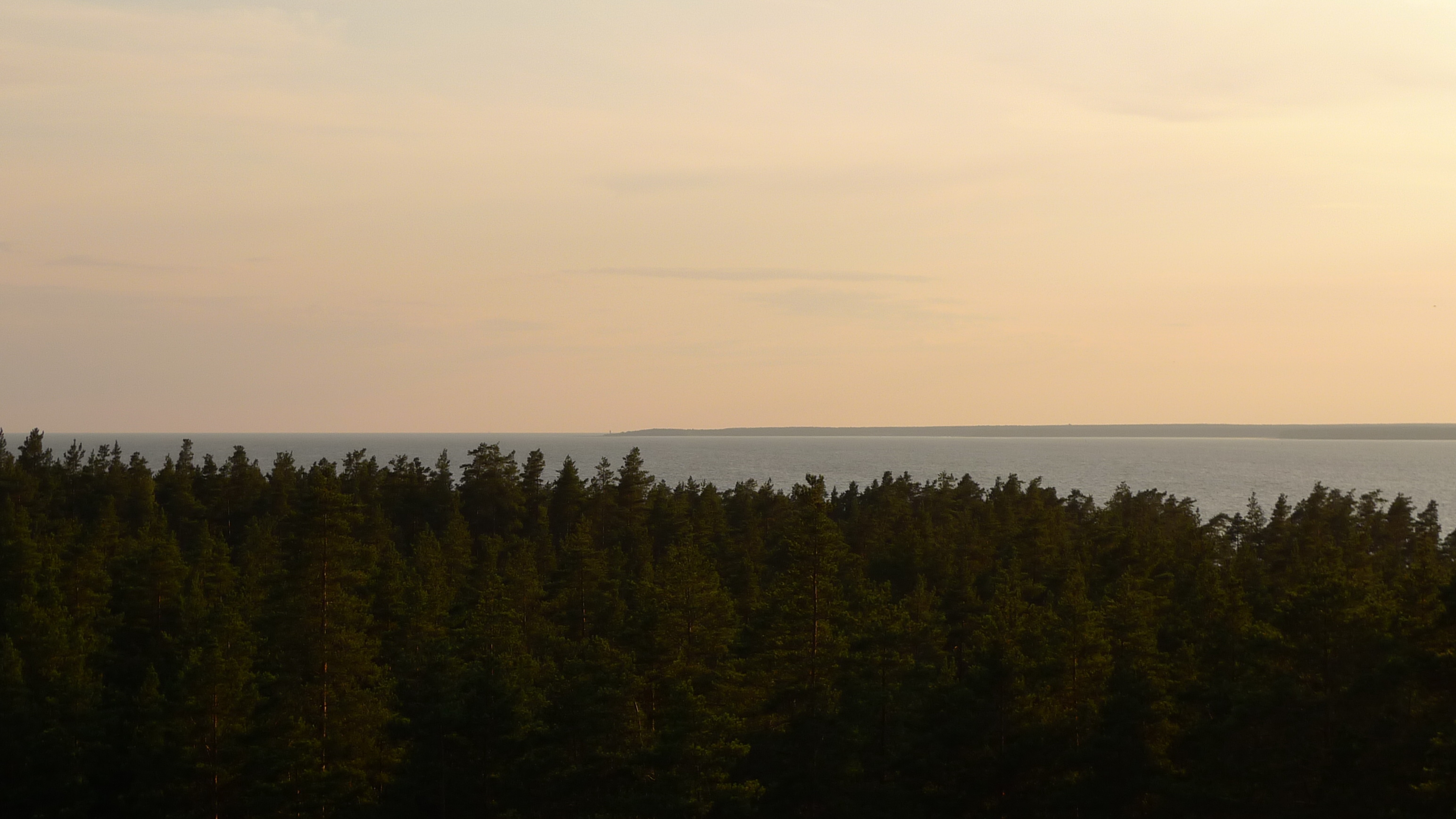 Финский залив в районе Приморска